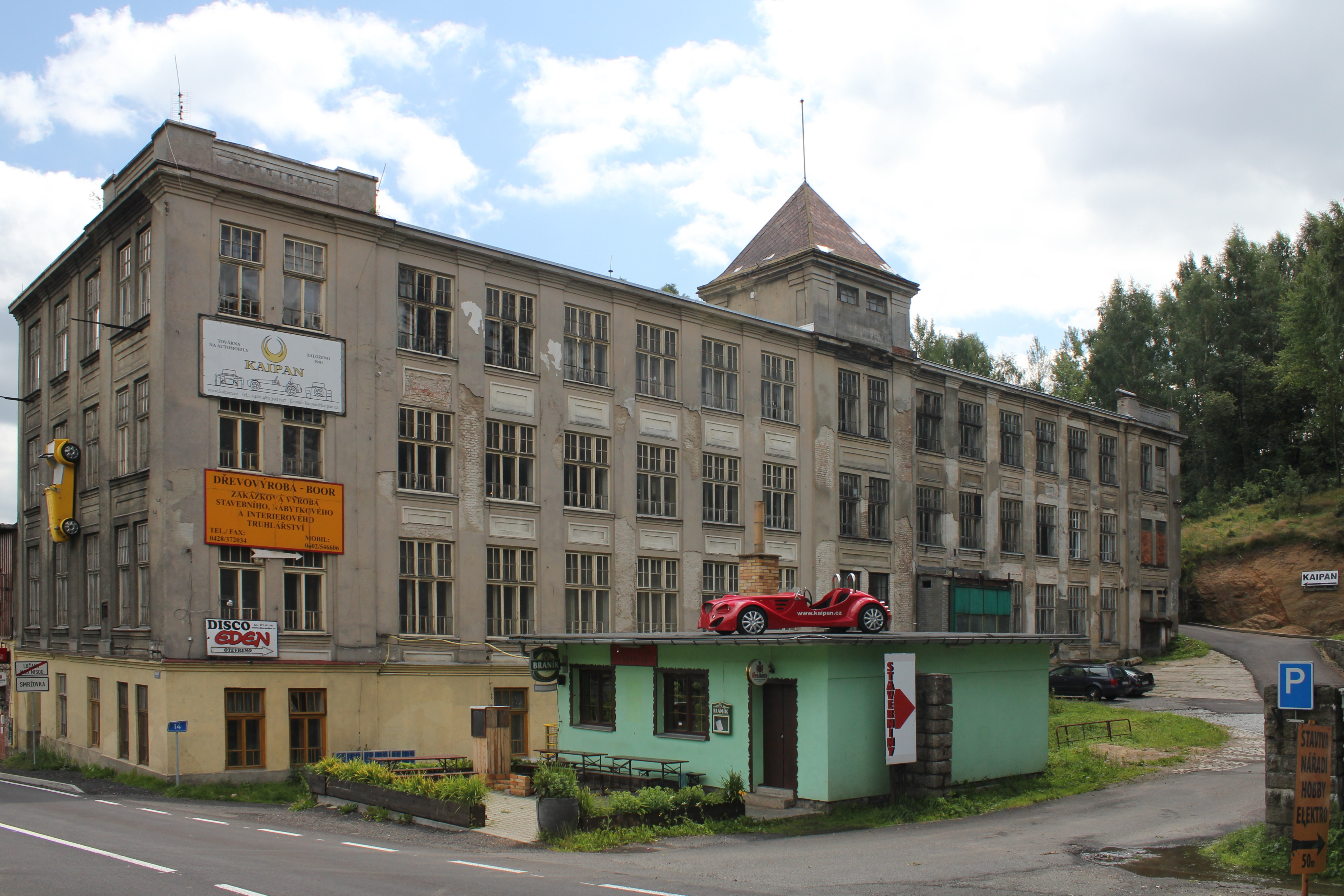 Budova továrny v níž sídlí výrobce roadsterů Kaipan